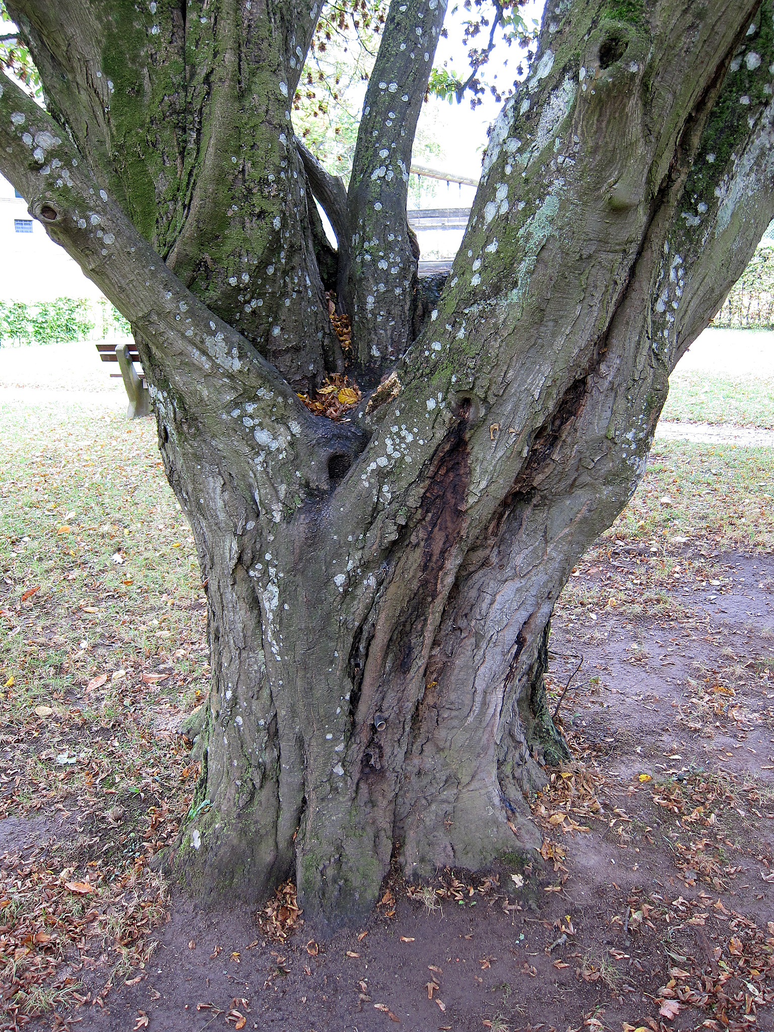 Hainbuche Brückenau